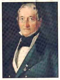 Freiherr Ludwig von Gienanth (1767-1848), Unternehmer in der Rheinpfalz